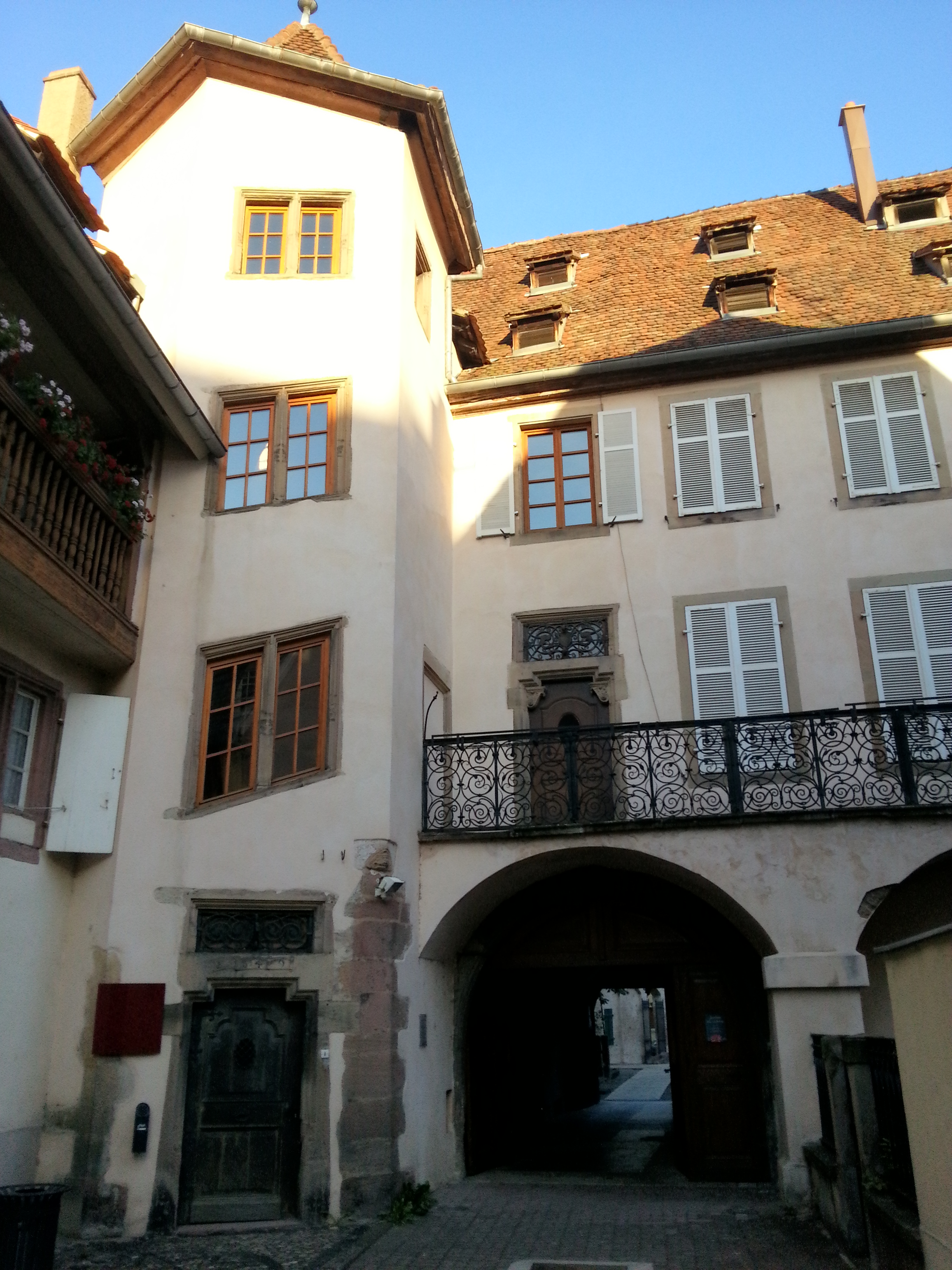 Maison, 7 place du Marché-aux-choux (Inscrit, 1929)